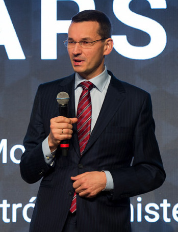 Minister rozwoju Mateusz Morawiecki podczas wystąpienia na otwarciu Campus Warsaw.